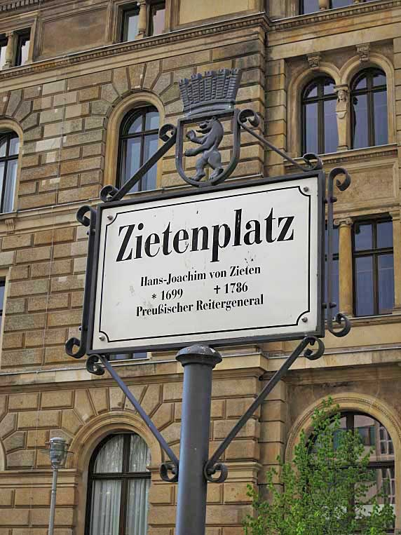 Straßenschild auf den Zietenplatz, Berlin, Juni 2012